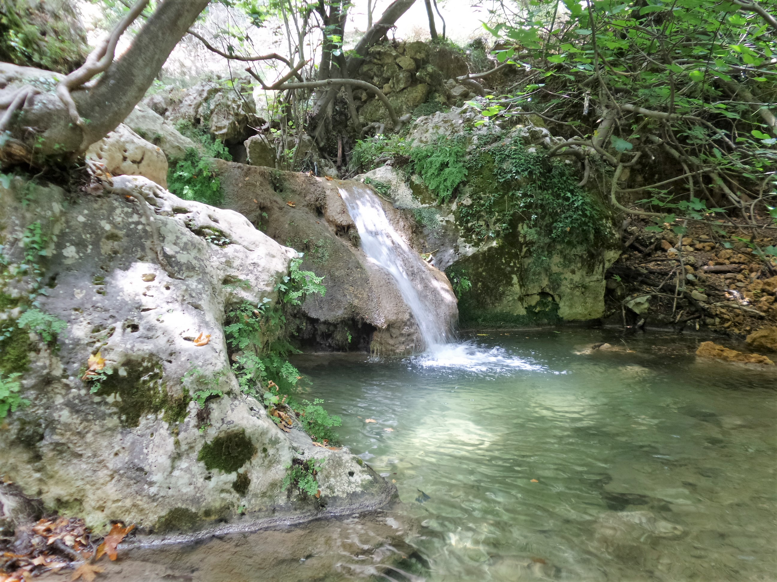 Wasserkaskade